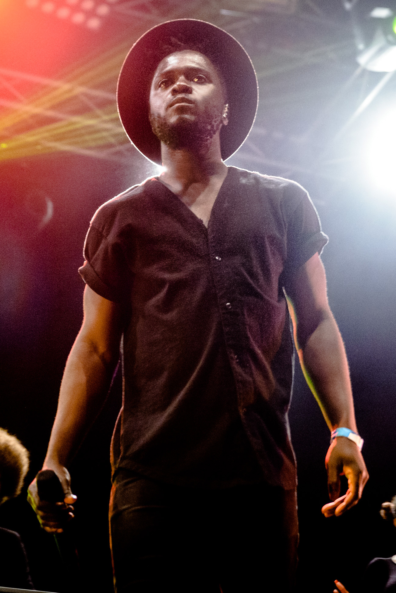 El cantante Kwabs en 2015